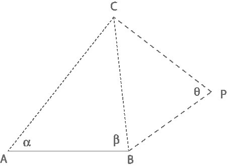 figuur ter illustratie van voorwaartse insnijding te gebruiken bij gelijknamig artikel eigengemaakte figuur